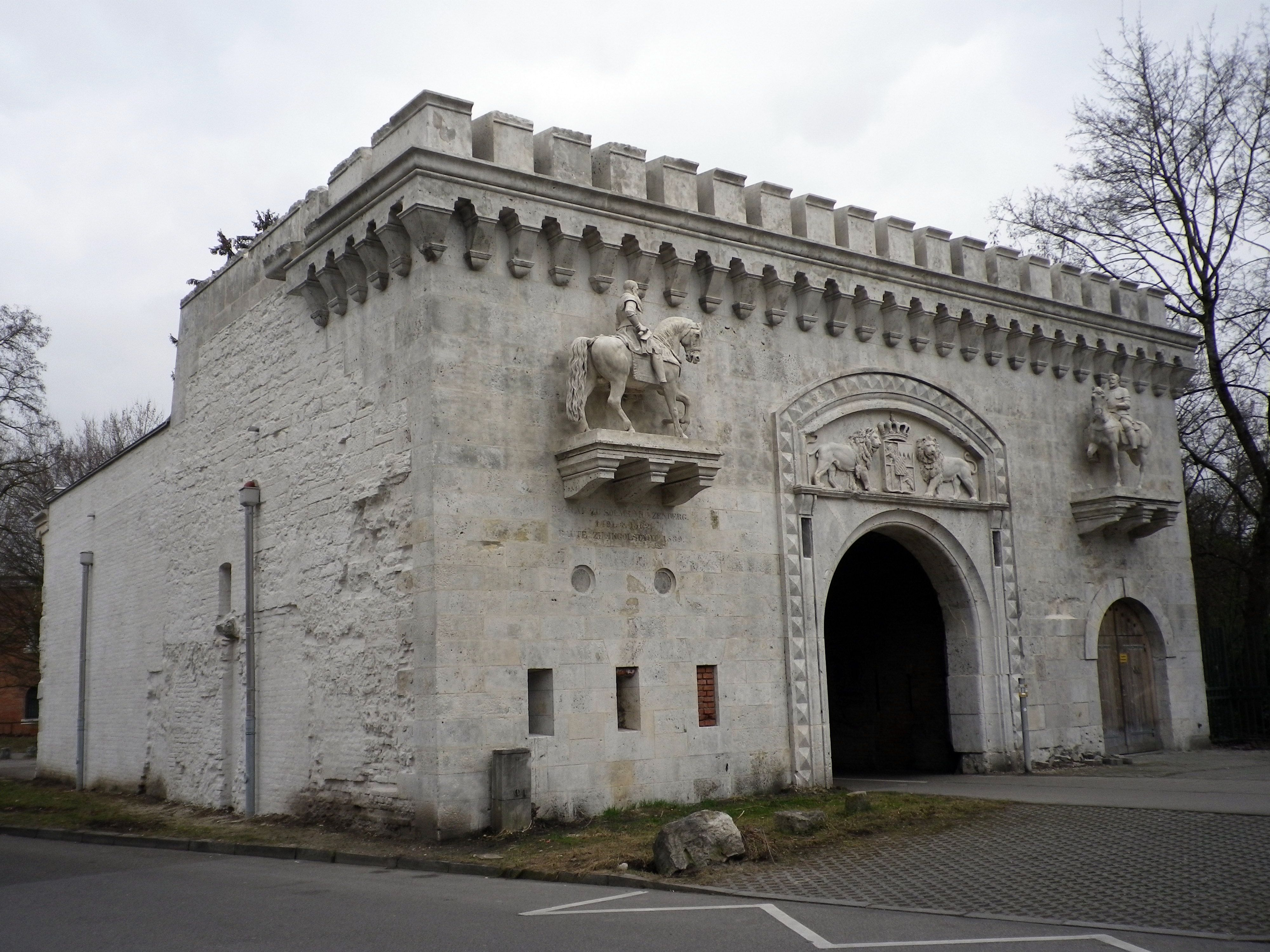 Kavalier Hepp in Ingolstadt mit den Reiterstatuen der Festungsbaumeister Graf Reinhard zu Solms (links) und Daniel Speckle/Specklin (rechts).